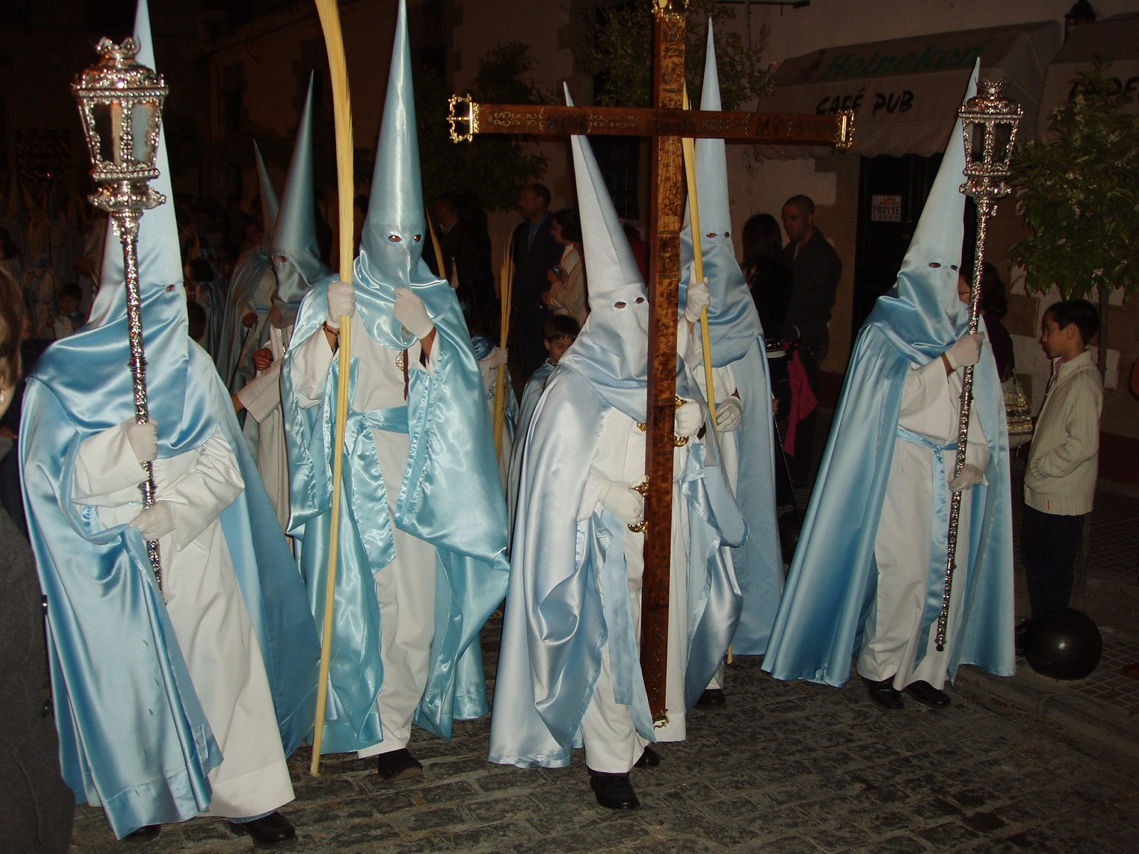 Comienzo de La Borriquita. Domingo de Ramos. Semana Santa en El Puerto de Santa María, Cádiz, España.